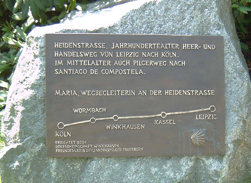 Hinweistafel in Winkhausen auf die Heidenstraße (Schmallenberg), Germany.